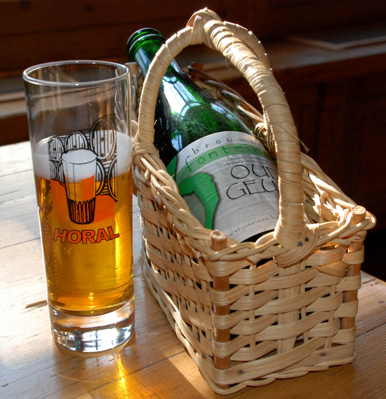 Oude geuze 3 fonteinen